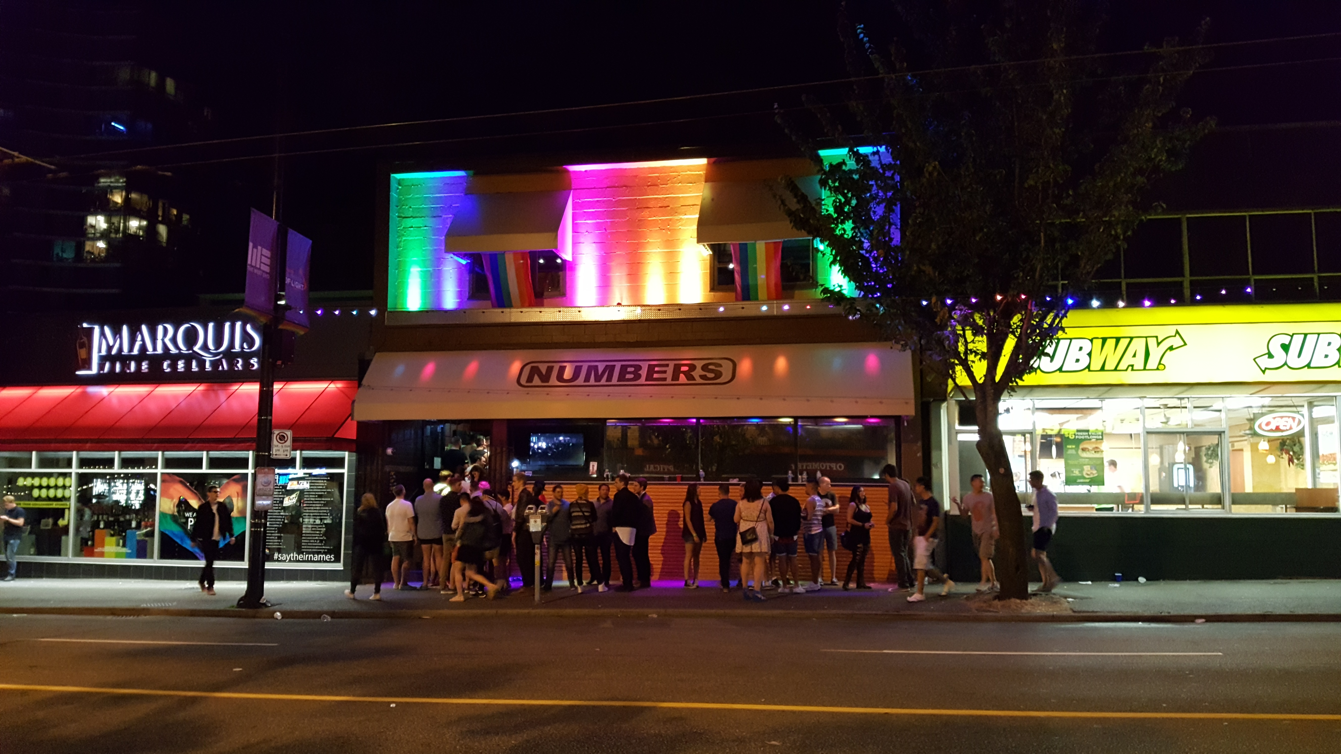 Numbers